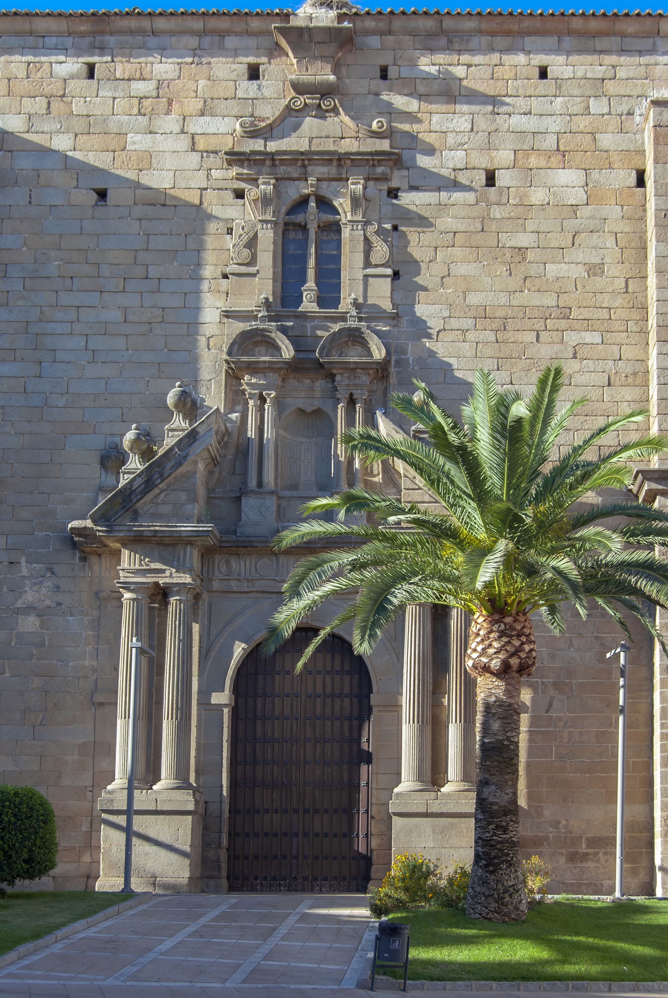 Miajadas